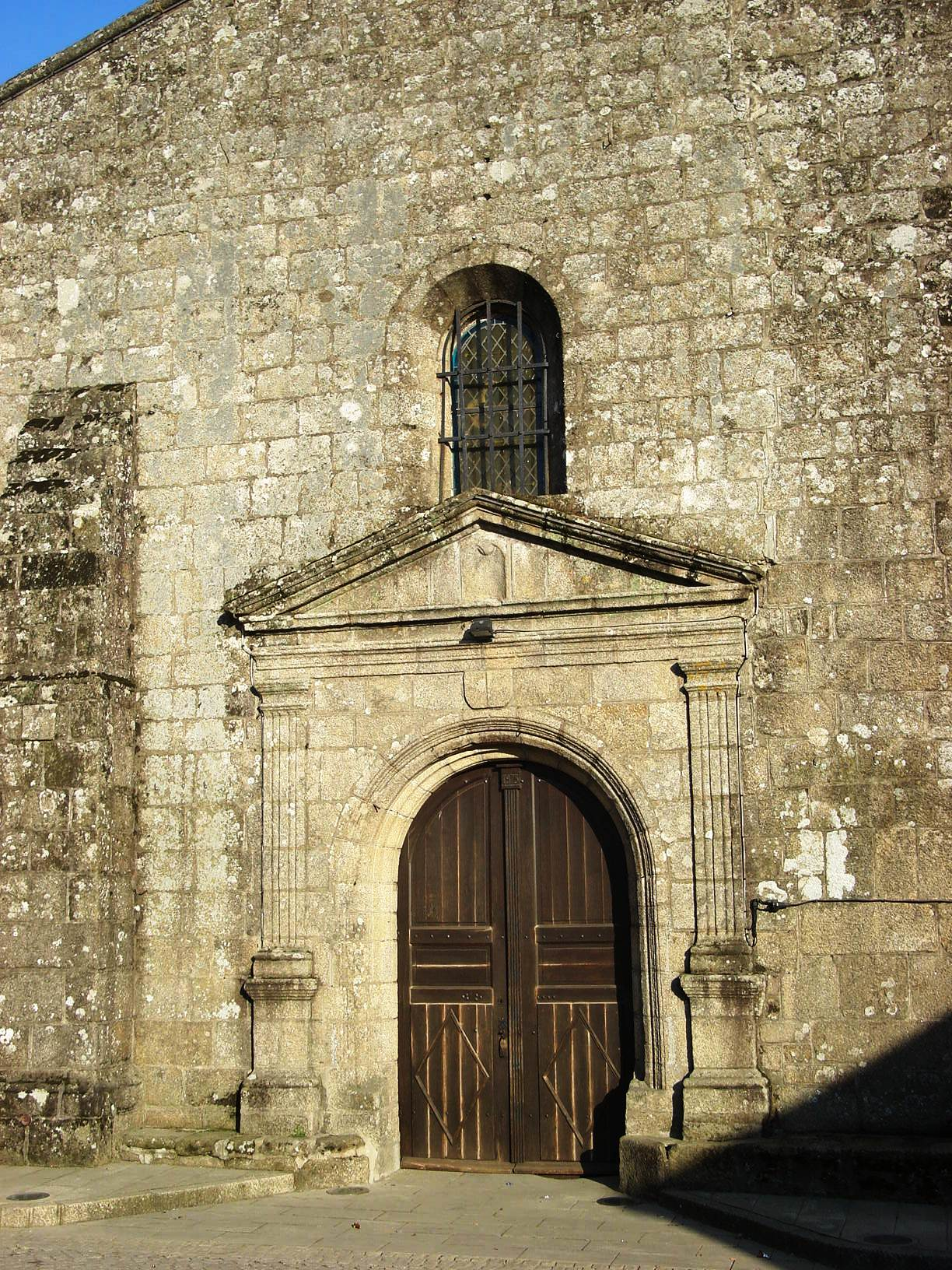 Église Notre Dame-des-Collines des Épesses, (Classé, 1991) .